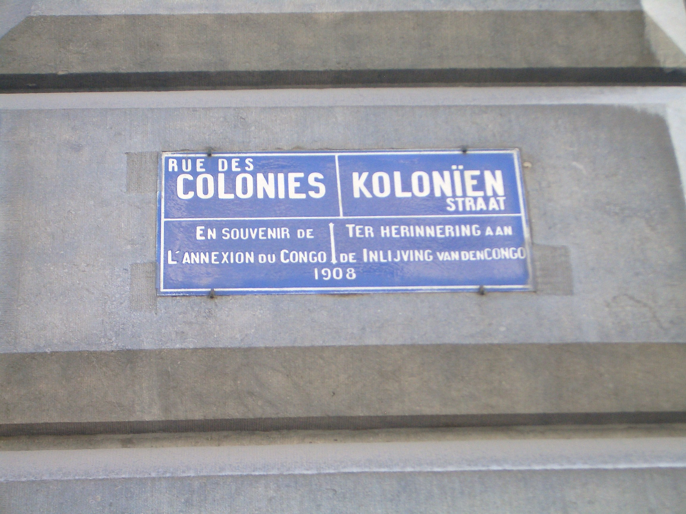 Kétnyelvű (francia-holland) utcanévtábla Brüsszelben (Rue de Colonies)